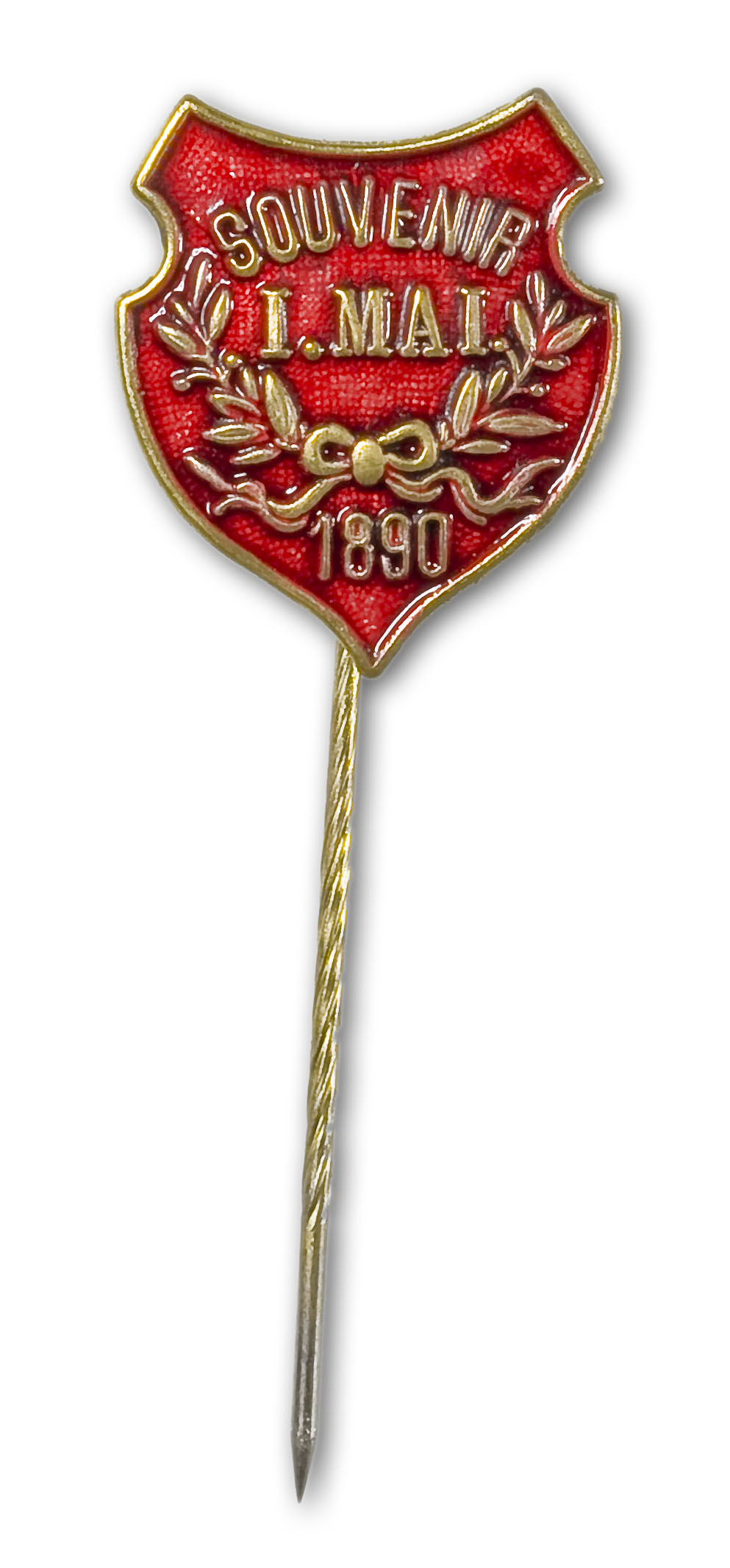 Maiabzeichen 1890, Österreich. Quelle: Maiabzeichen-Galerie der SPÖ auf ( bzw. )